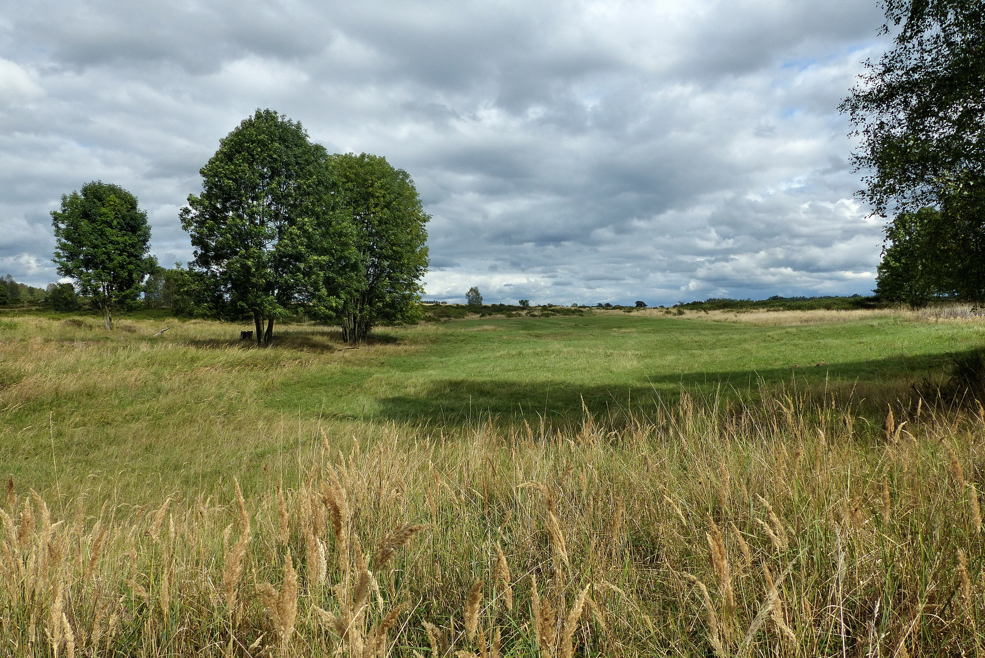 Bývalý Kracmanov